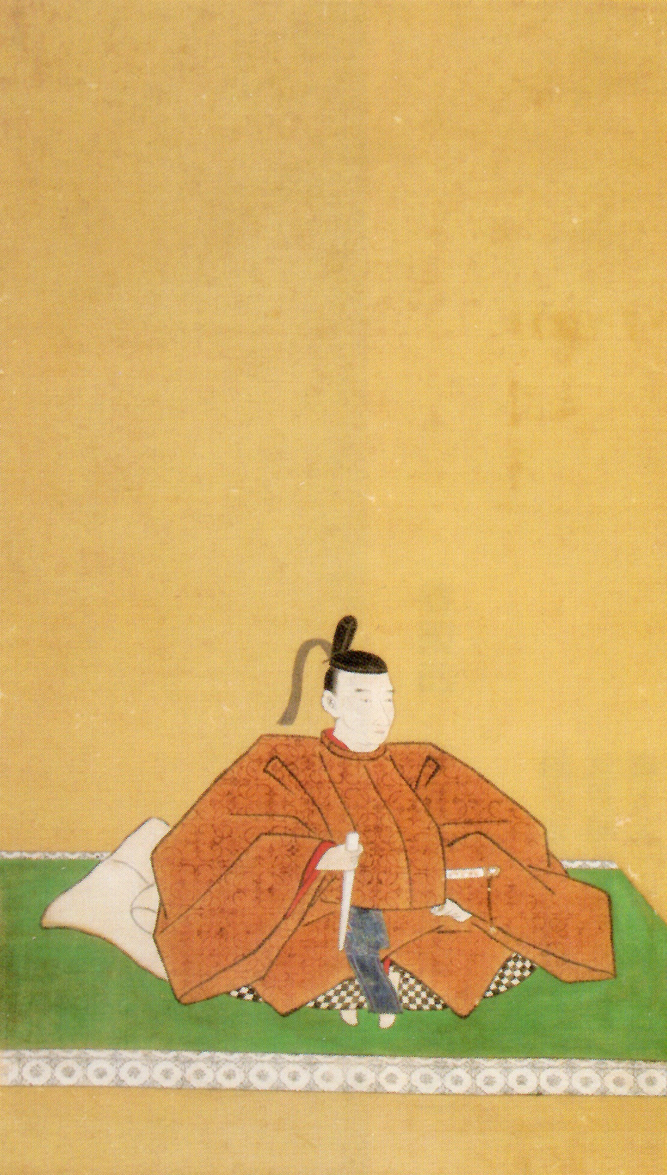 本多政成の肖像。